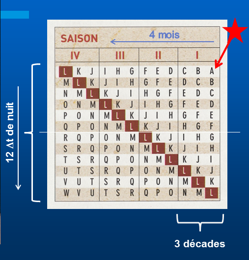 Tableau d'analyse d'une table stellaire partielle.